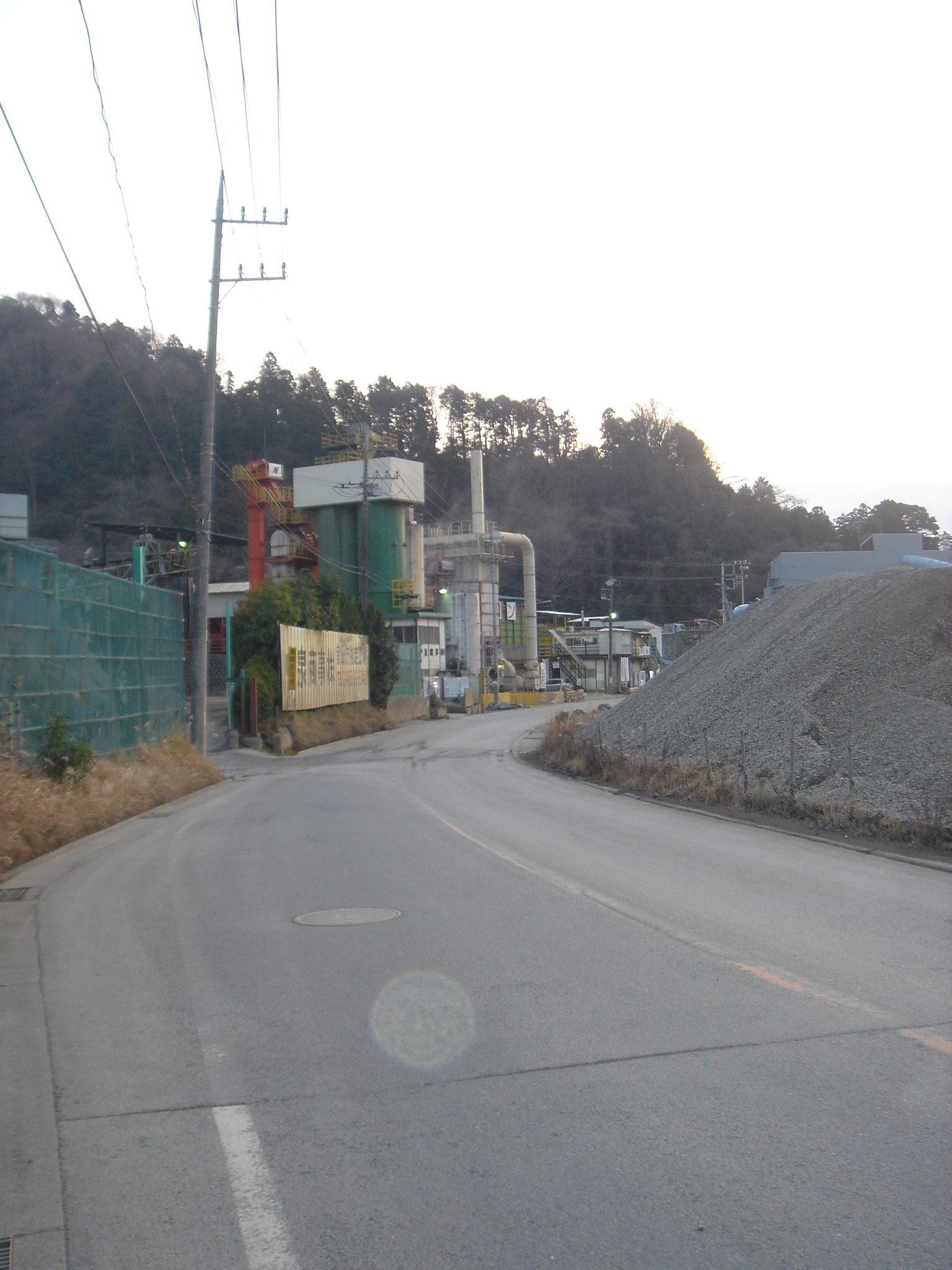 r710